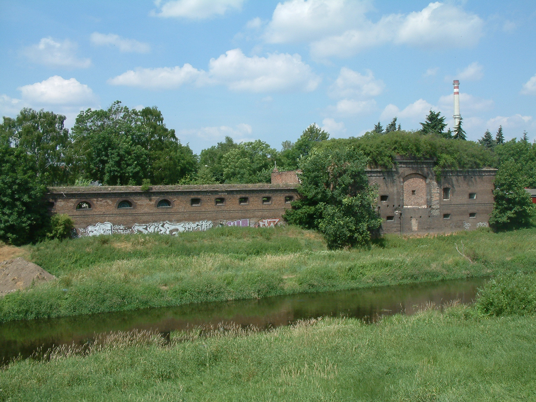 Remanents of Śluza Katedralna (Dom Schleuse) in Poznań